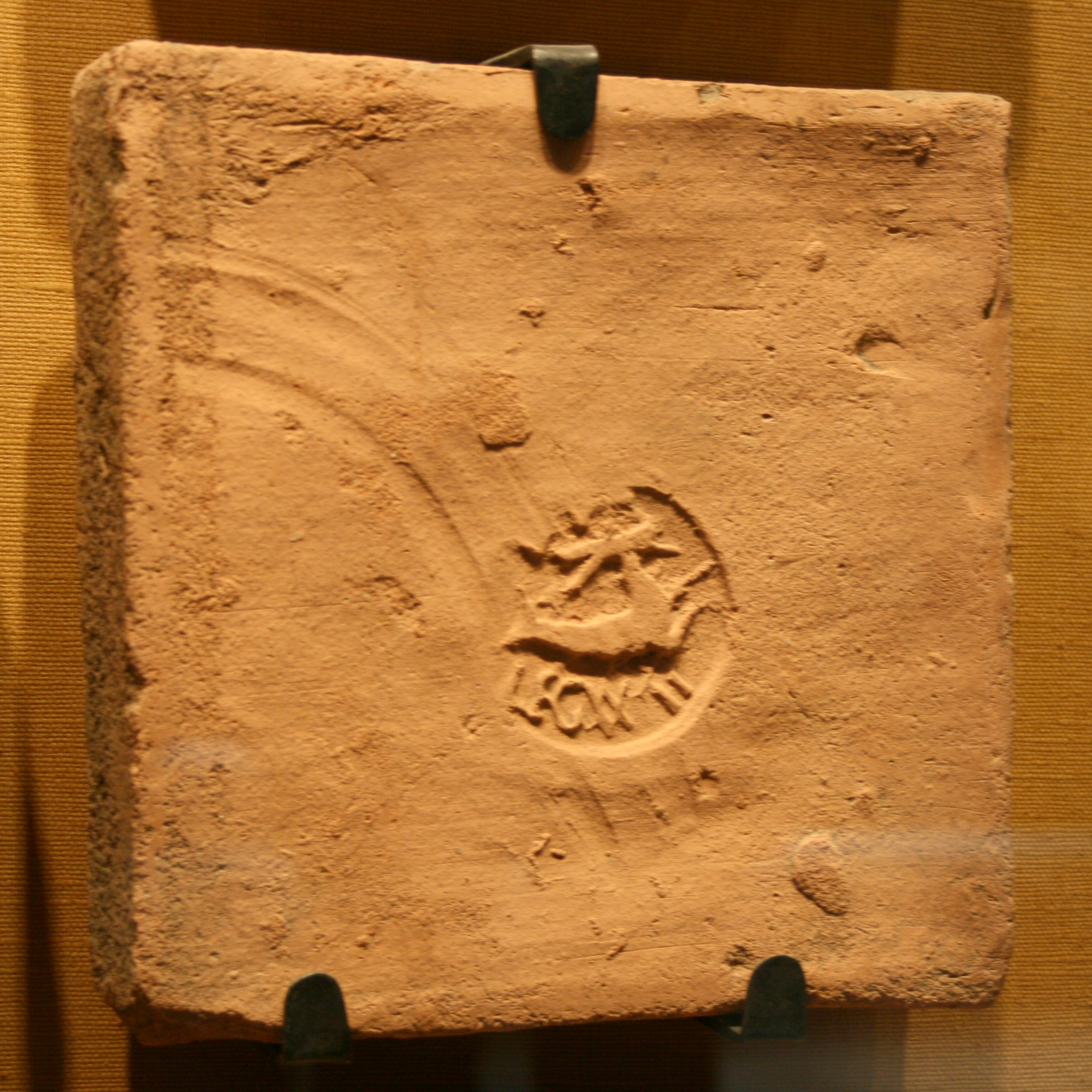 Ziegelstempel der Legio XXII, ausgestellt im Saalburgmuseum Bad Homburg v.d.H. Mit freundlicher Genehmigung des Museums.